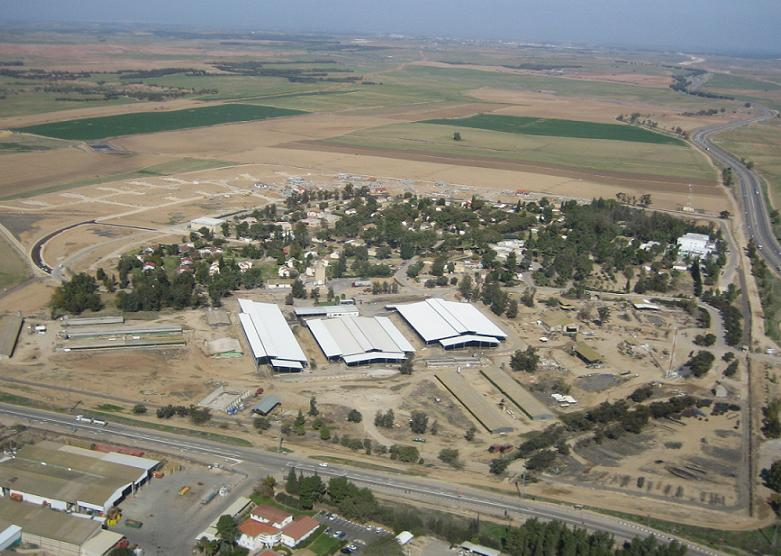 קיבוץ בית קמה. צילום אוויר לכיוון צפון